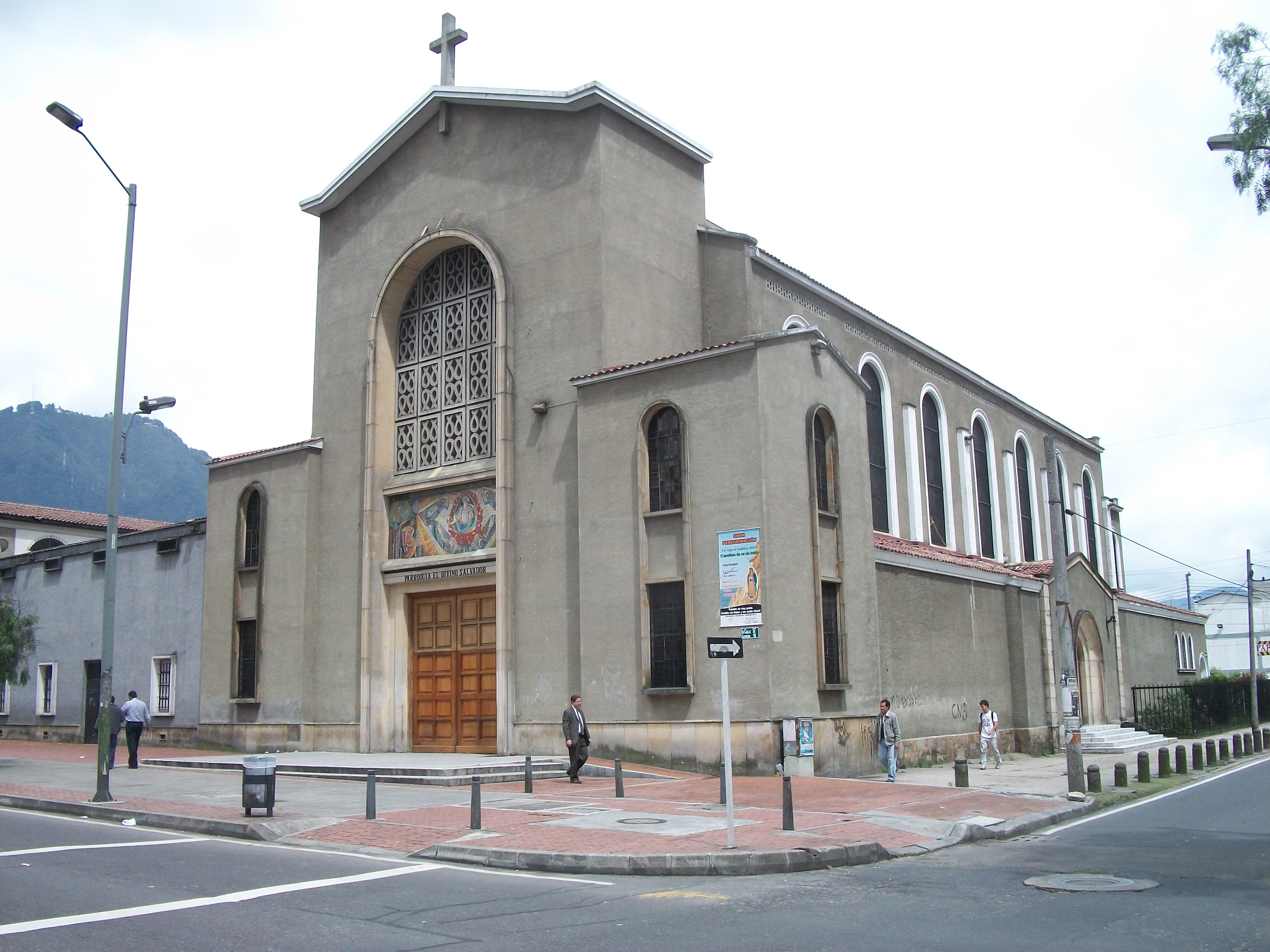 Iglesia del Divino Salvador en Bogotá, calle Cincuenta y siete con carrera Diecinueve. Barrio Banco Central de la localidad de Teusaquillo.